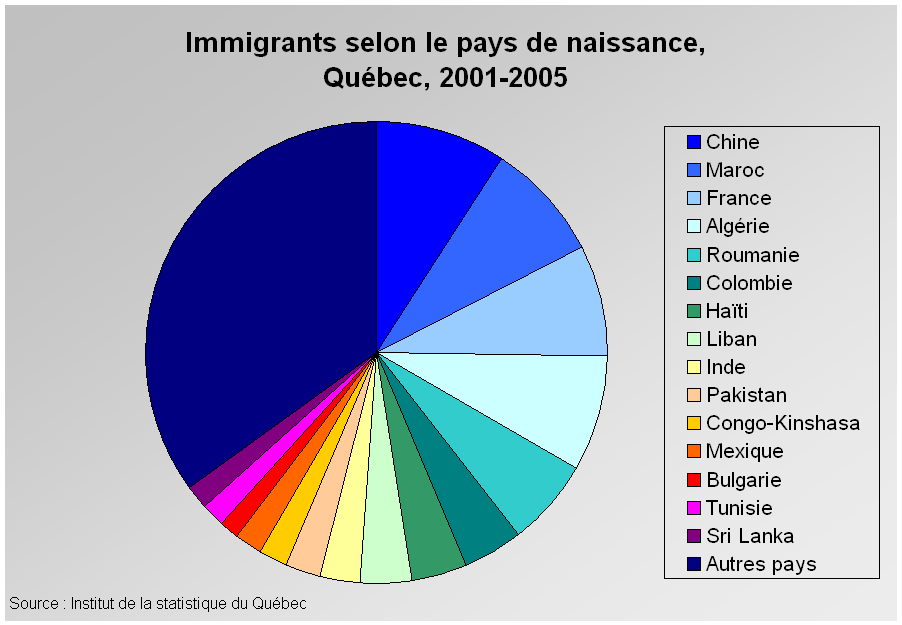 Immigrants selon le pays de naissance, Québec, 2001-2005 / Immigrants by country of origin, Québec, 2001-2005